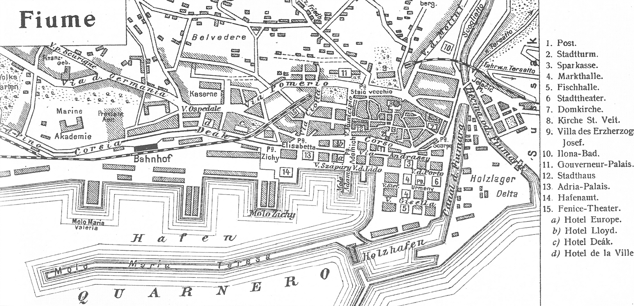 Stadtplan von Fiume (now Rijeka, Croatia) um 1900